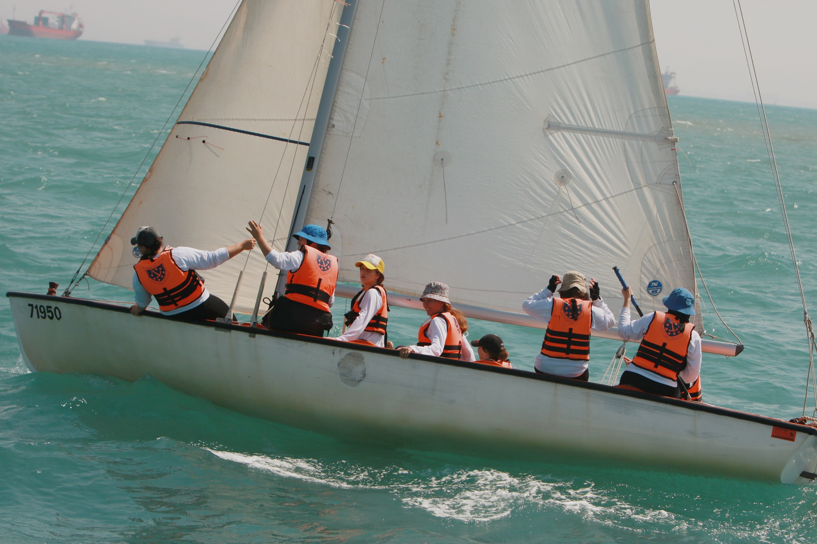 סירת האימונים של בית הספר עם צוות קדטים ומדריך 2018